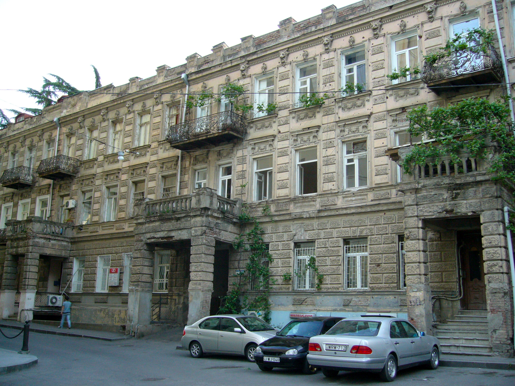 vu de l'extérieur Georgia